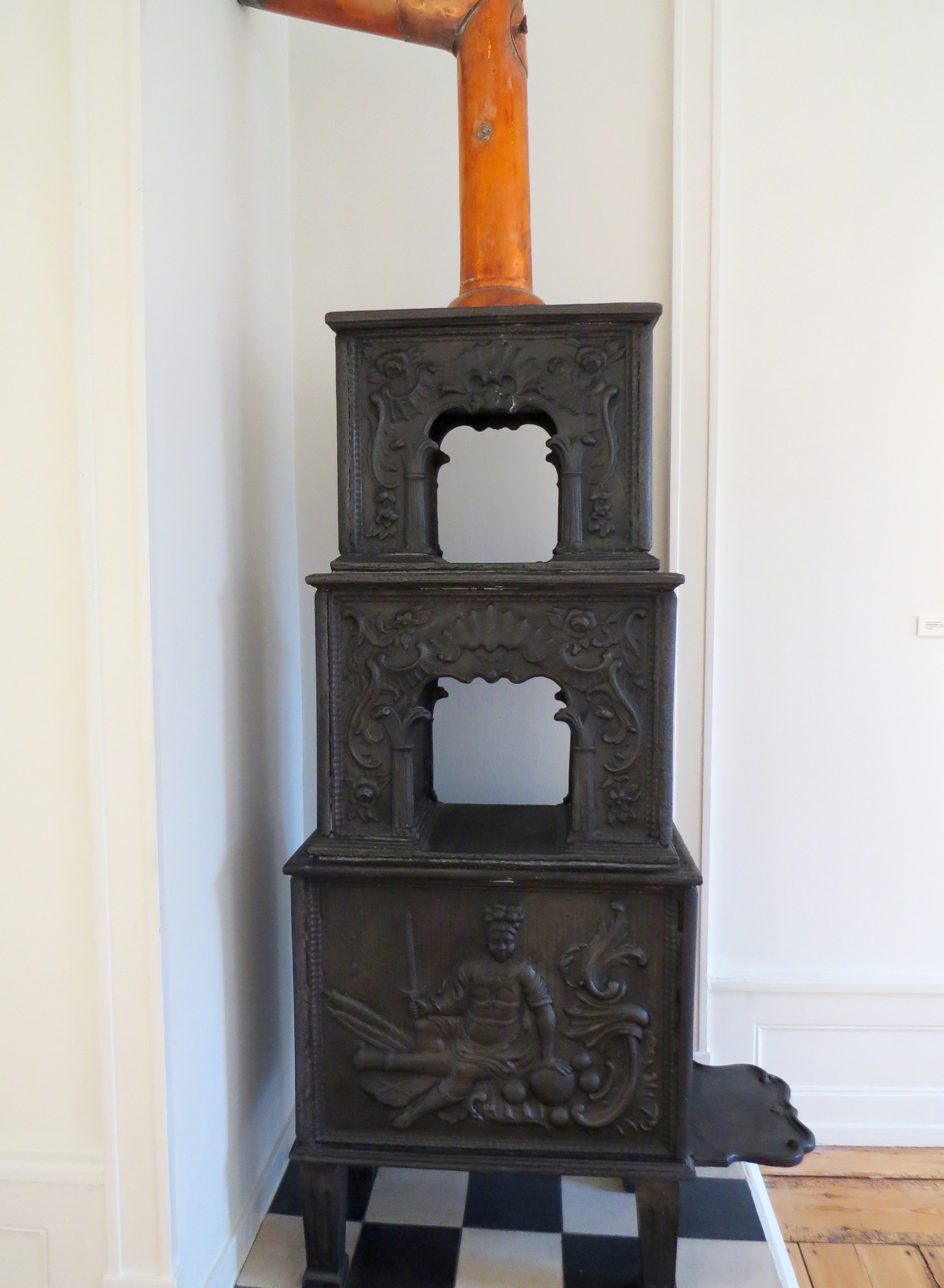 1700-talsovn med «Mars på kanon» fra Egelands Wærk, Rønnebæksholm, Sjælland